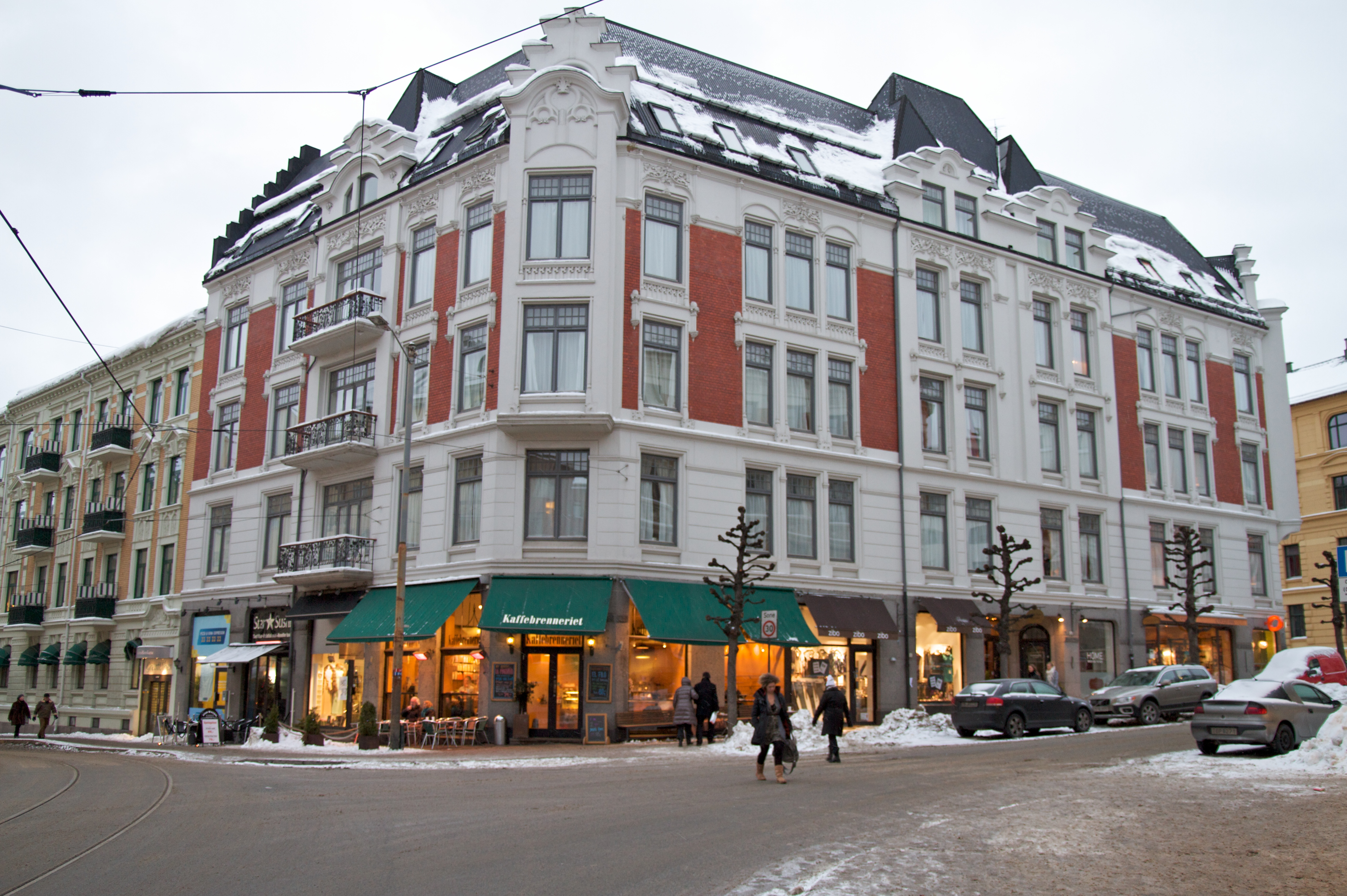 Skovveien 8 i Oslo.